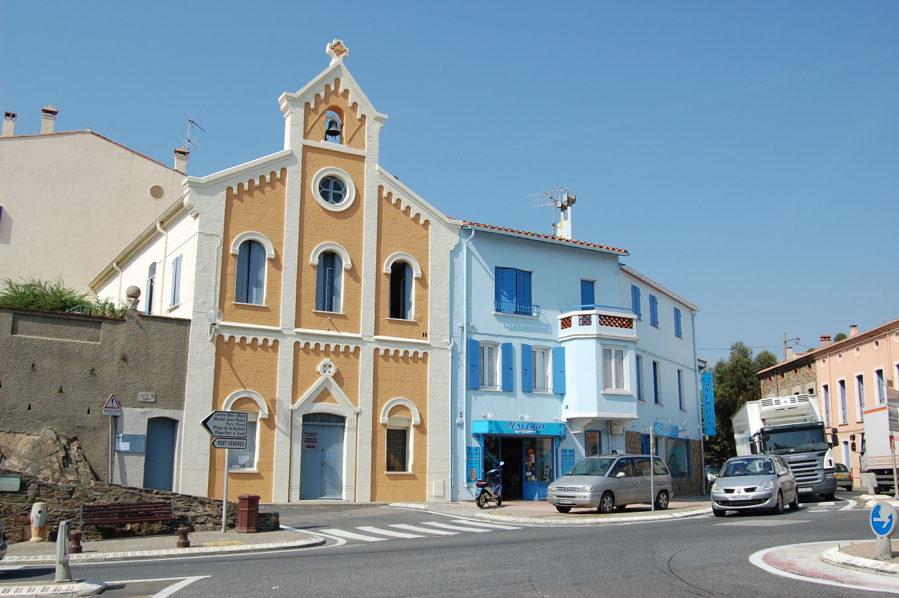 Temple de la ville de Collioure (photographie 3/3)